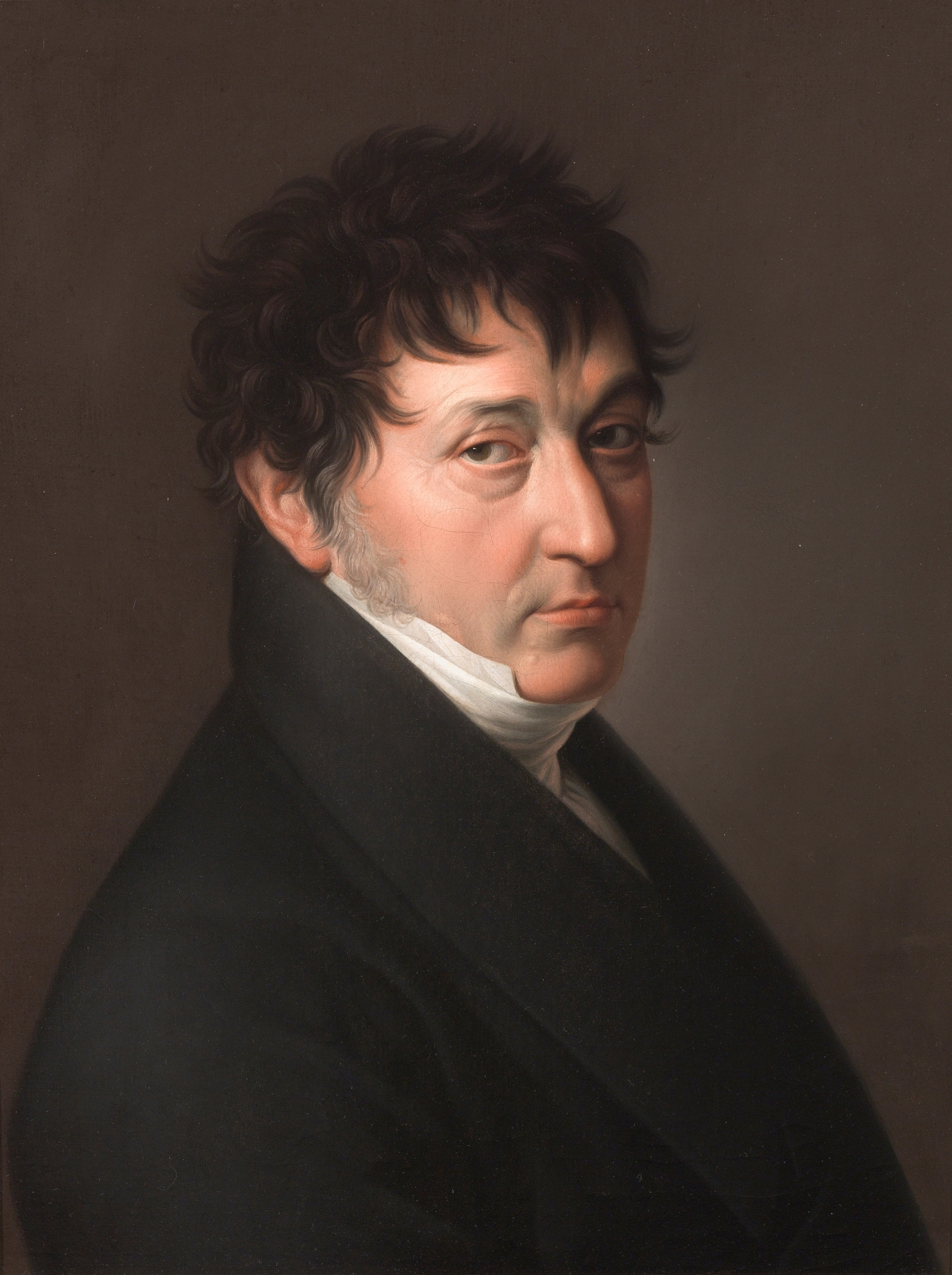 Autorretrato del pintor español Zacarías González Velázquez (1763-1834), que fue hijo del también pintor Antonio González Velázquez.